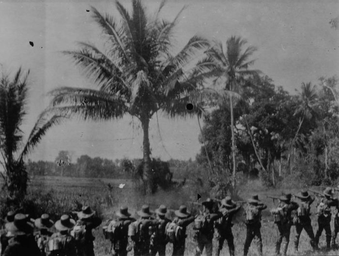 Foto. Foto is gemaakt tijdens de Balische expeditie in 1906. Militairen van het KNIL op verkenning in de omgeving van Sesetan tijdens de militaire expeditie op Bali